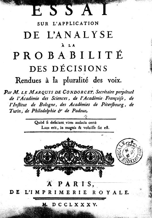 Page de titre de l'Essai sur l'application de l'analyse à la probabilité des décisions rendues à la pluralité des voix Image probablement du domaine public Reproduction d'une œuvre plane dans le domaine public